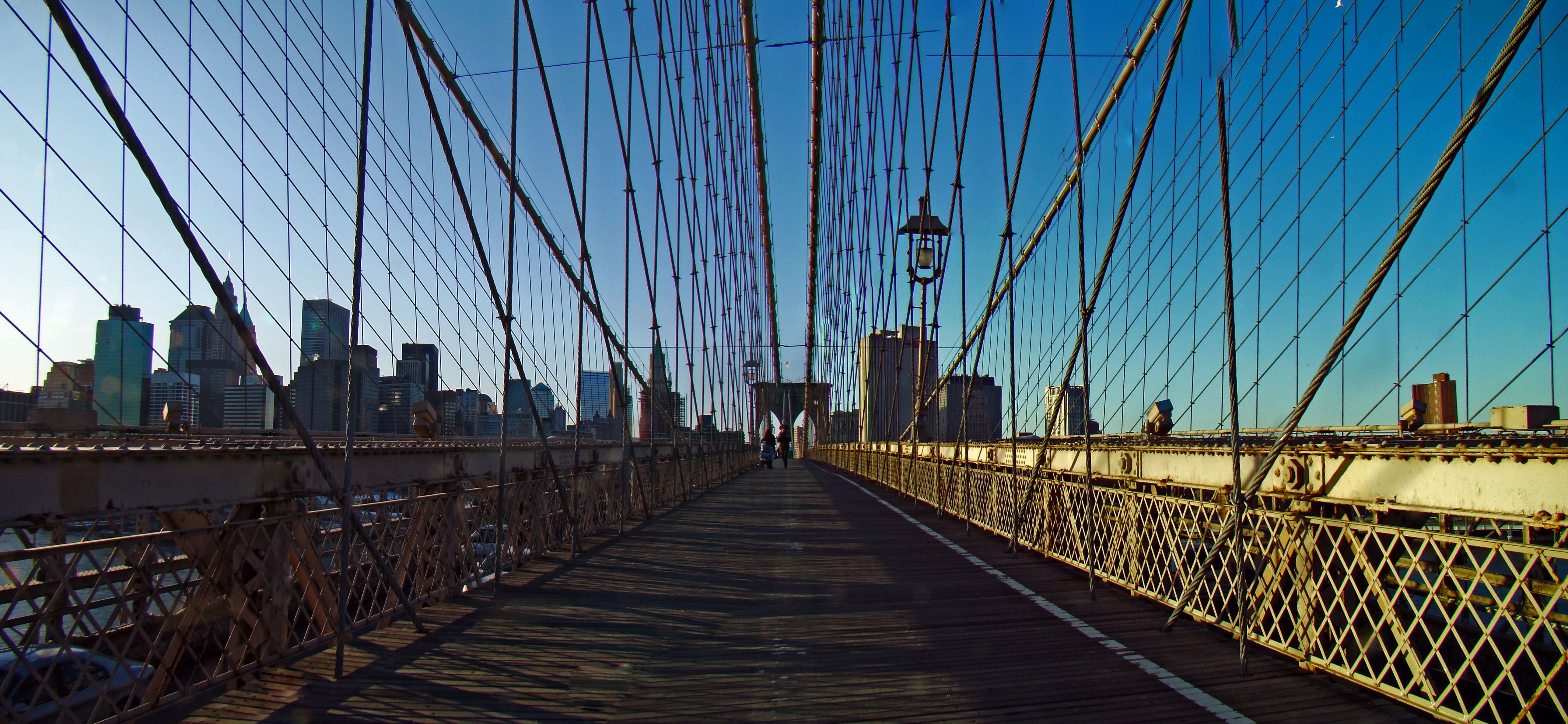 Panoramablick von der Brooklyn Bridge auf Manhattan